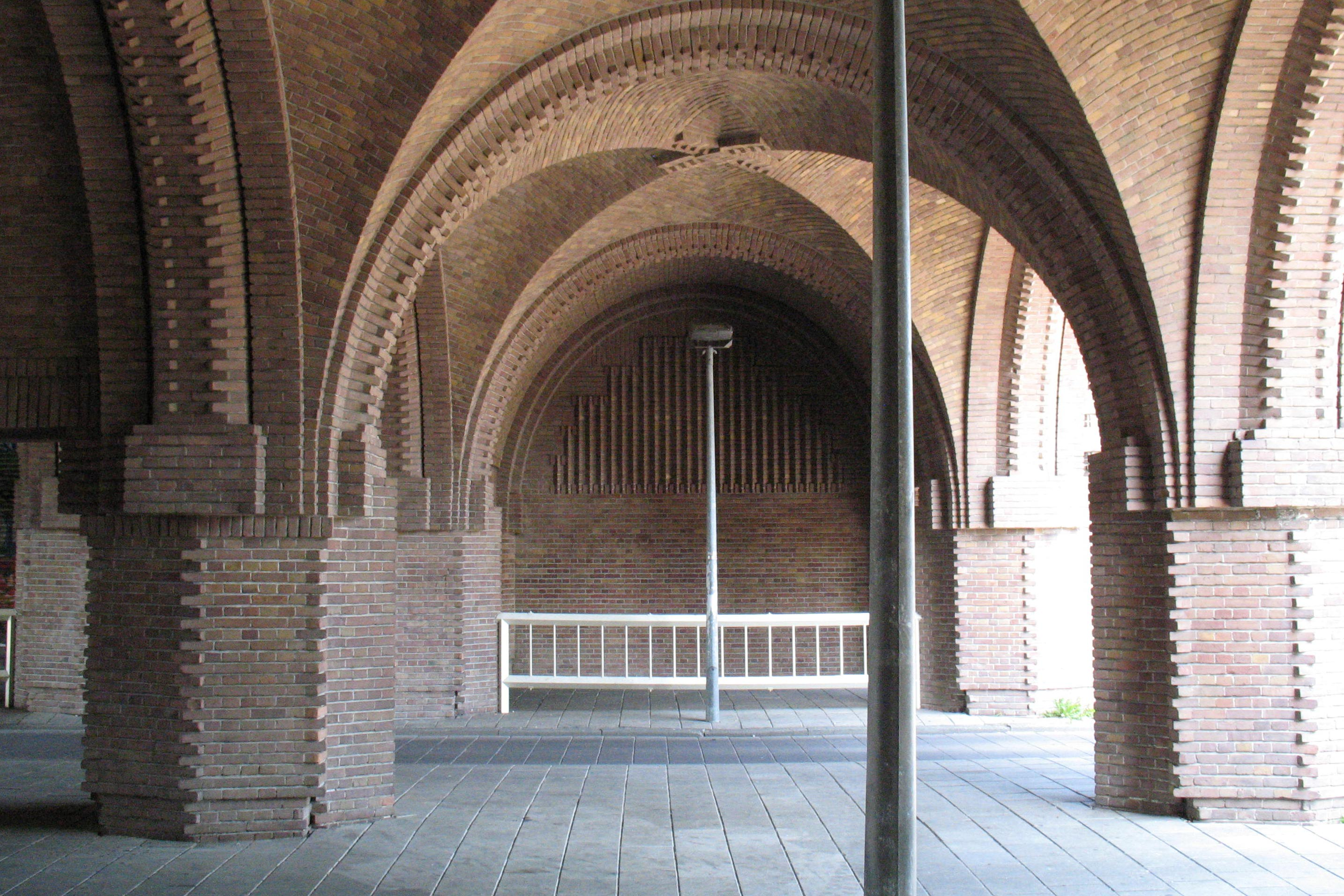 Amsterdams Lyceum, Valeriusplein 15, Amsterdam. Grammar school in Amsterdam. Bike path underneath the building.